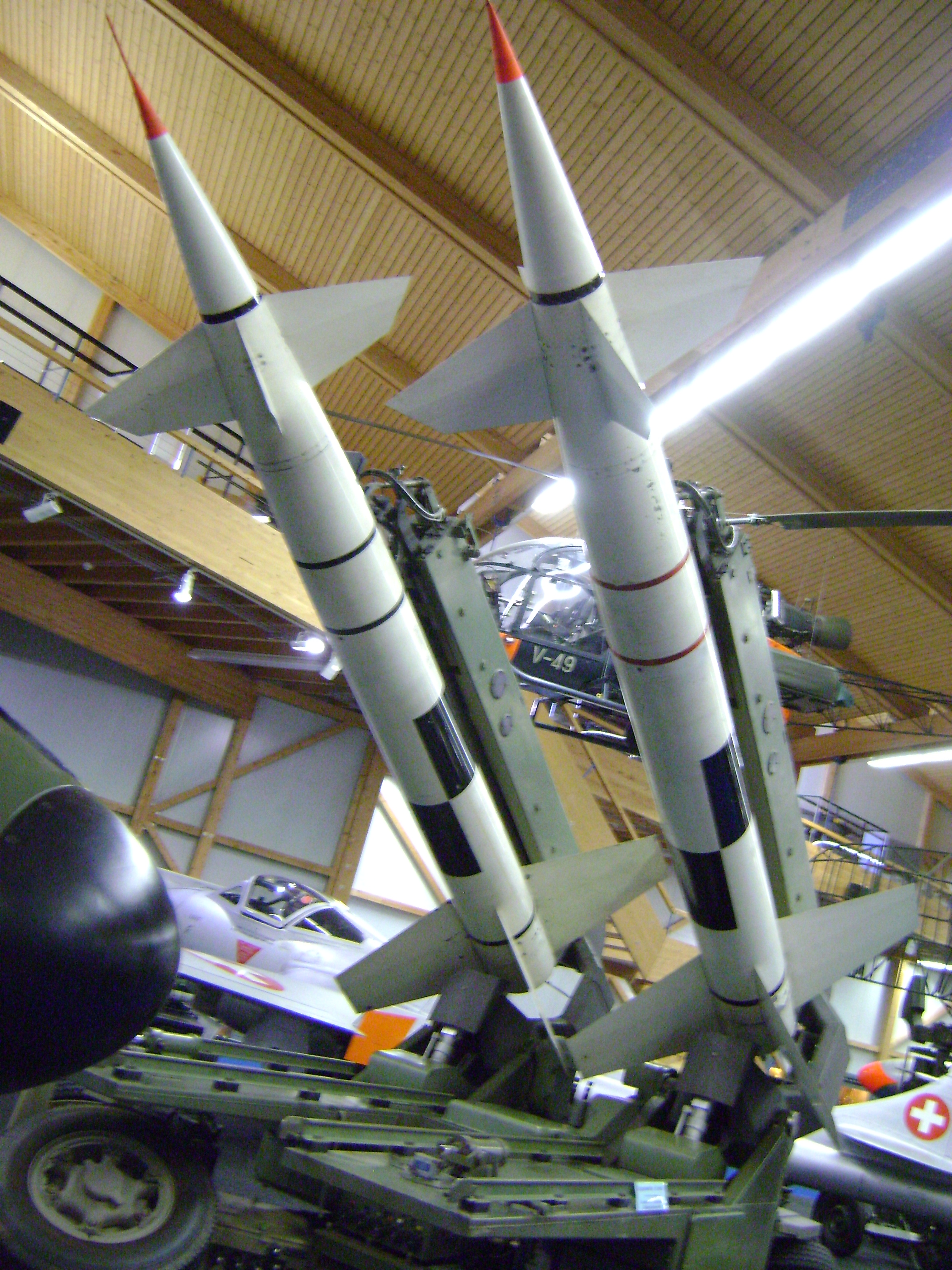 Doppelstartllafette mit 2 Kriens RSC Luftabwehrraketen von Oerlikon im Fliegermuseum Dübendorf